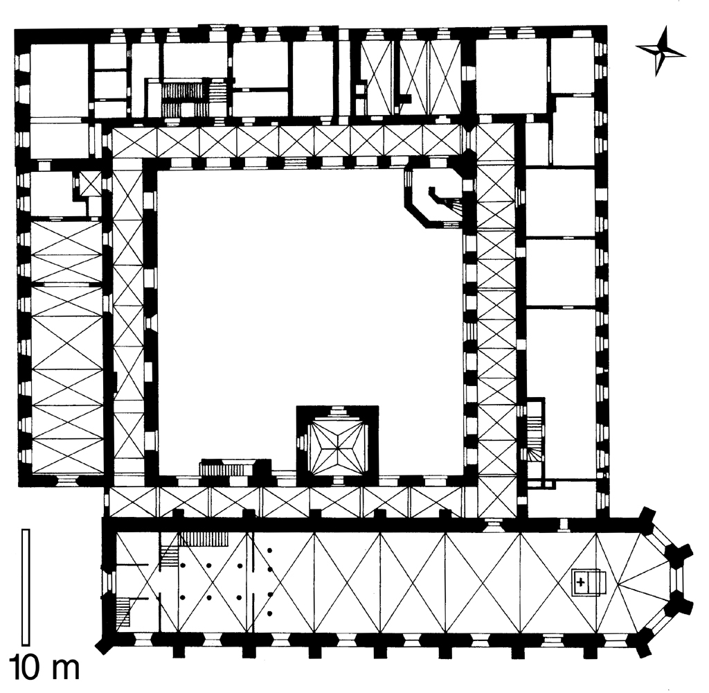 Grundriß Klausur und Kirche Kloster Stift zum Heiligengrabe